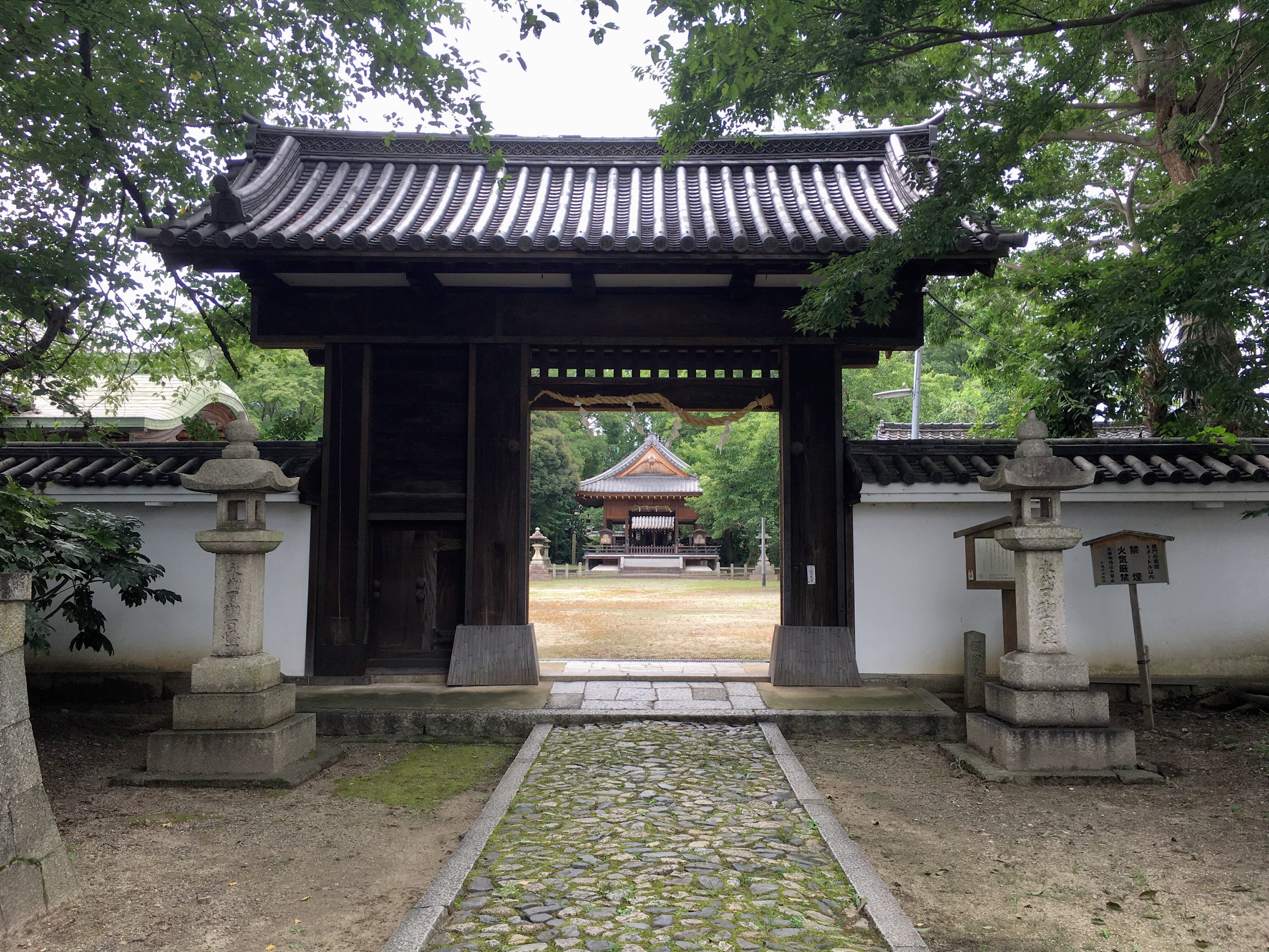 2019年7月、膳所神社で撮影。